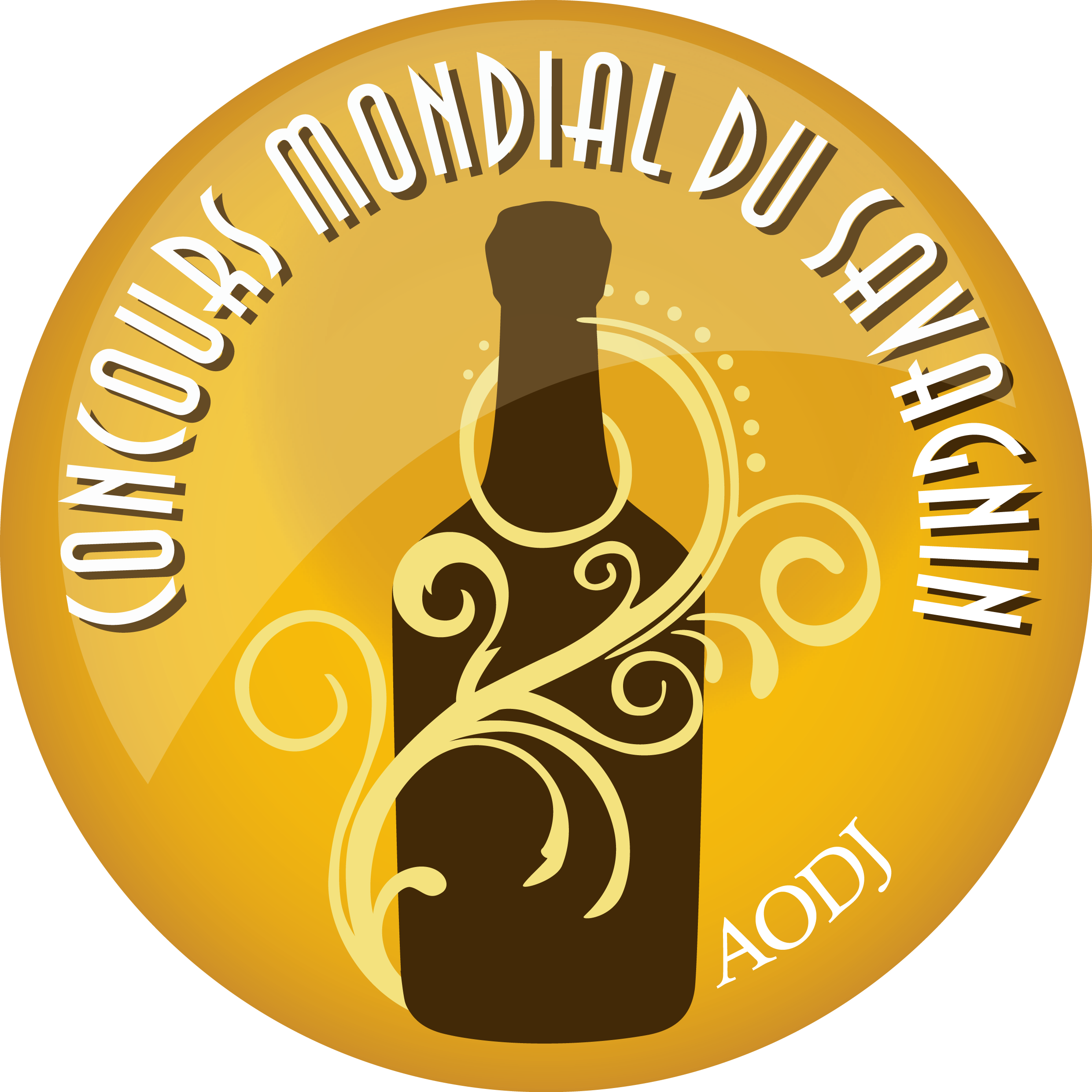 Logo concours mondial du savagnin